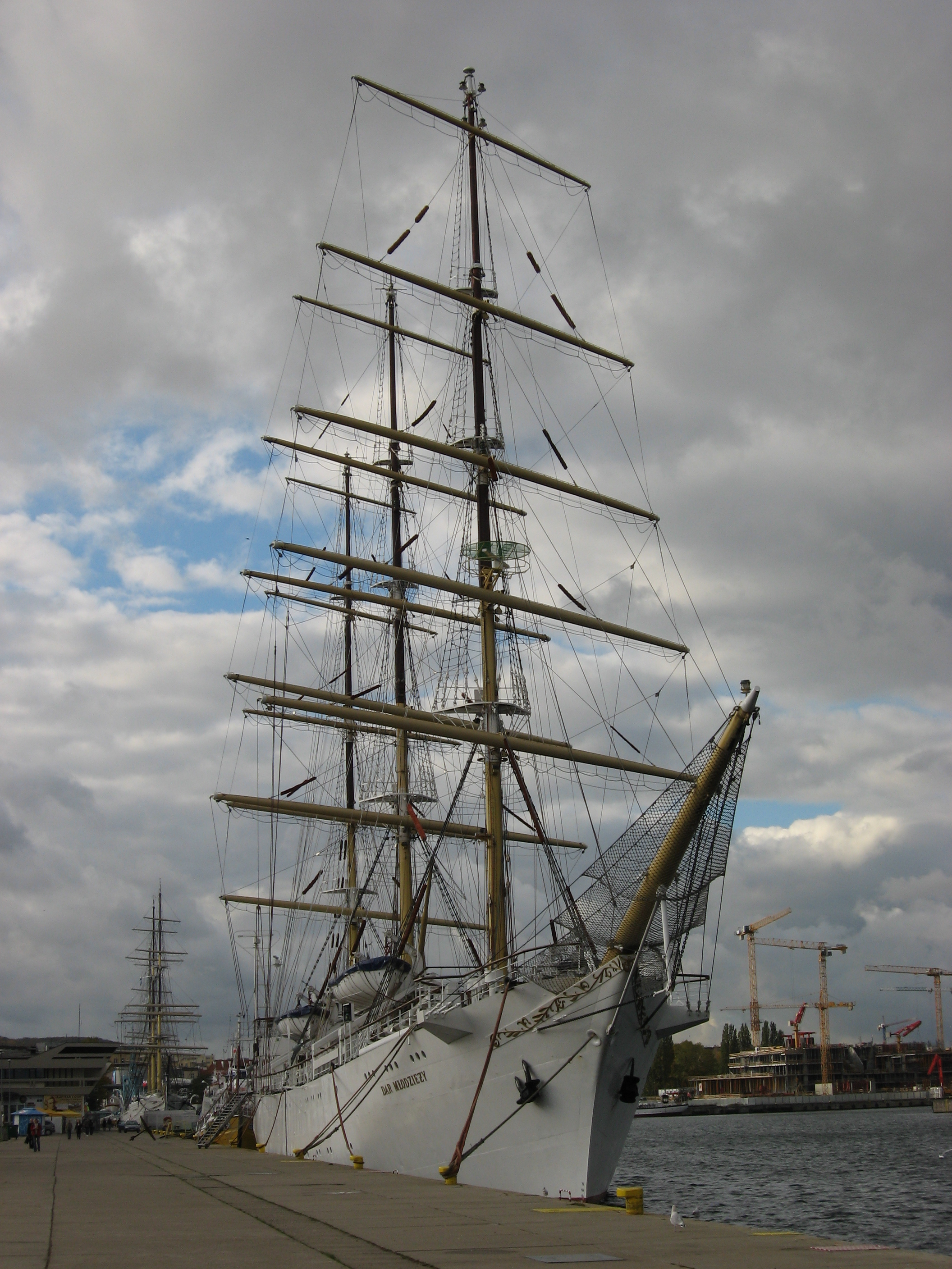 Dar Młodzieży przycumowany na Nabrzeżu Prezydenta w Gdyni.